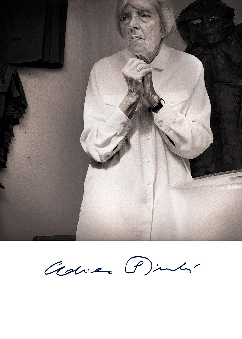 Adriena Šimotová, Praha 2001 Cyklus: Osobnosti